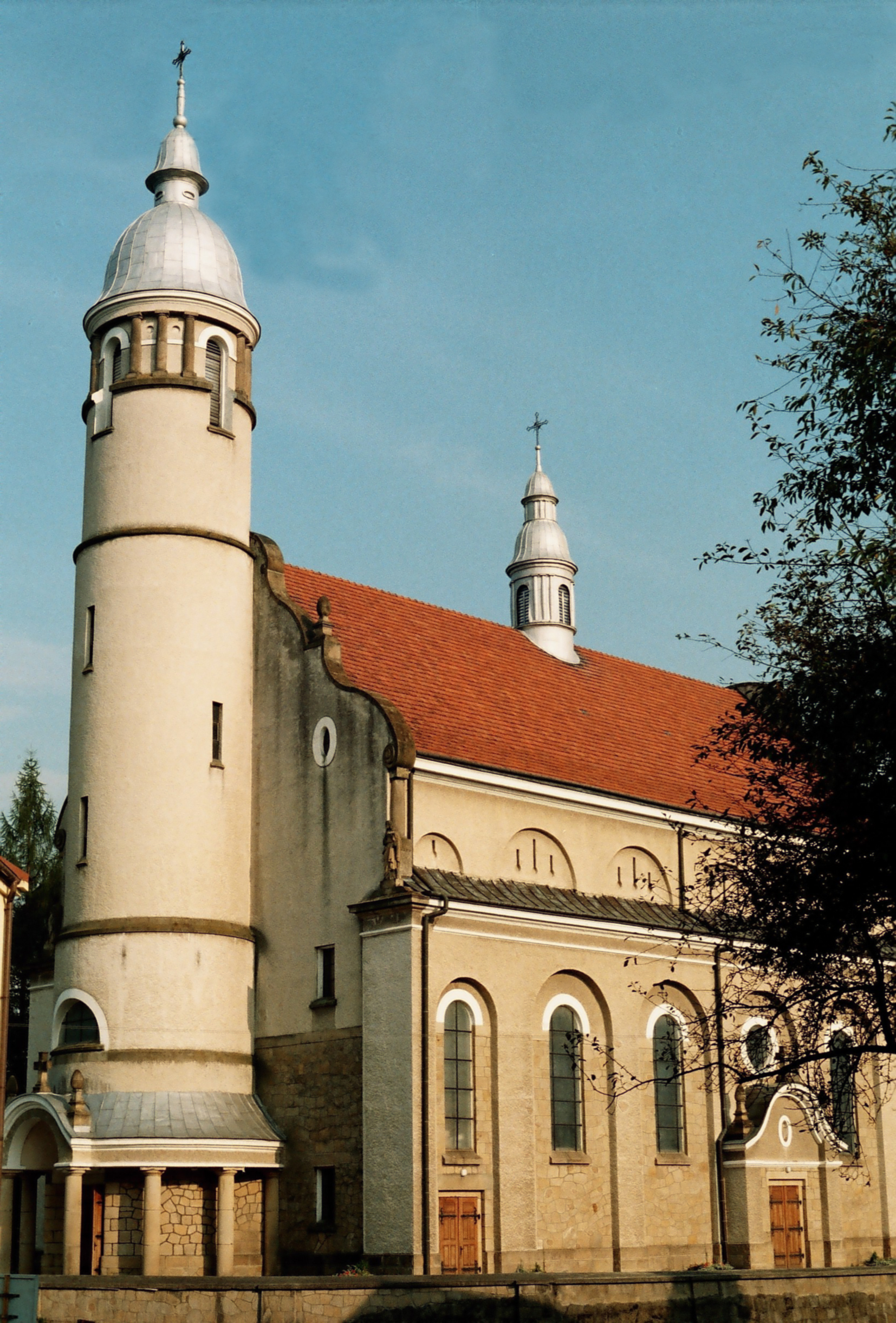 Frysztak - zespół kościoła parafialnego: kościół pw. Narodzenia NMP (zabytek nr A-500 z 28.02.2011)